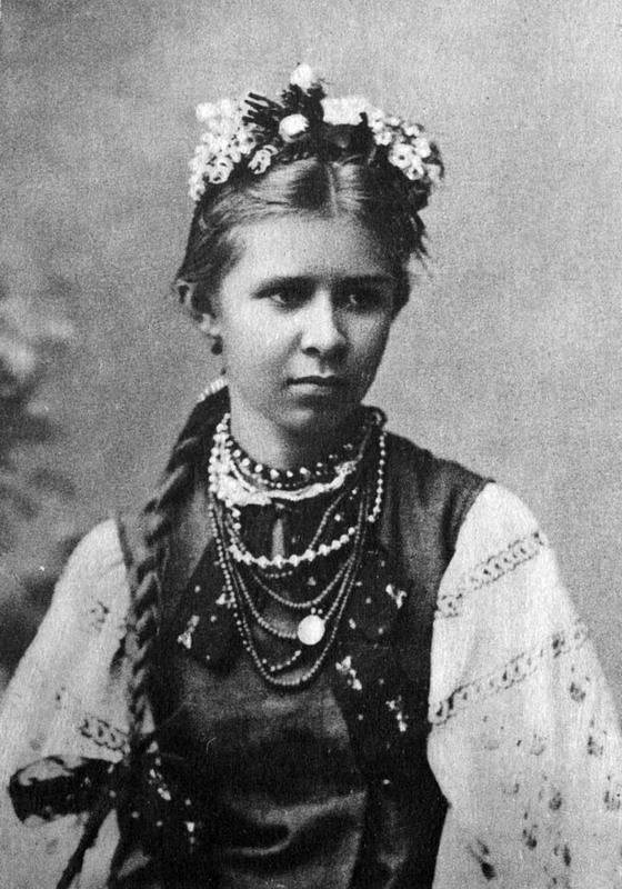 Лариса Косач (Леся Українка)